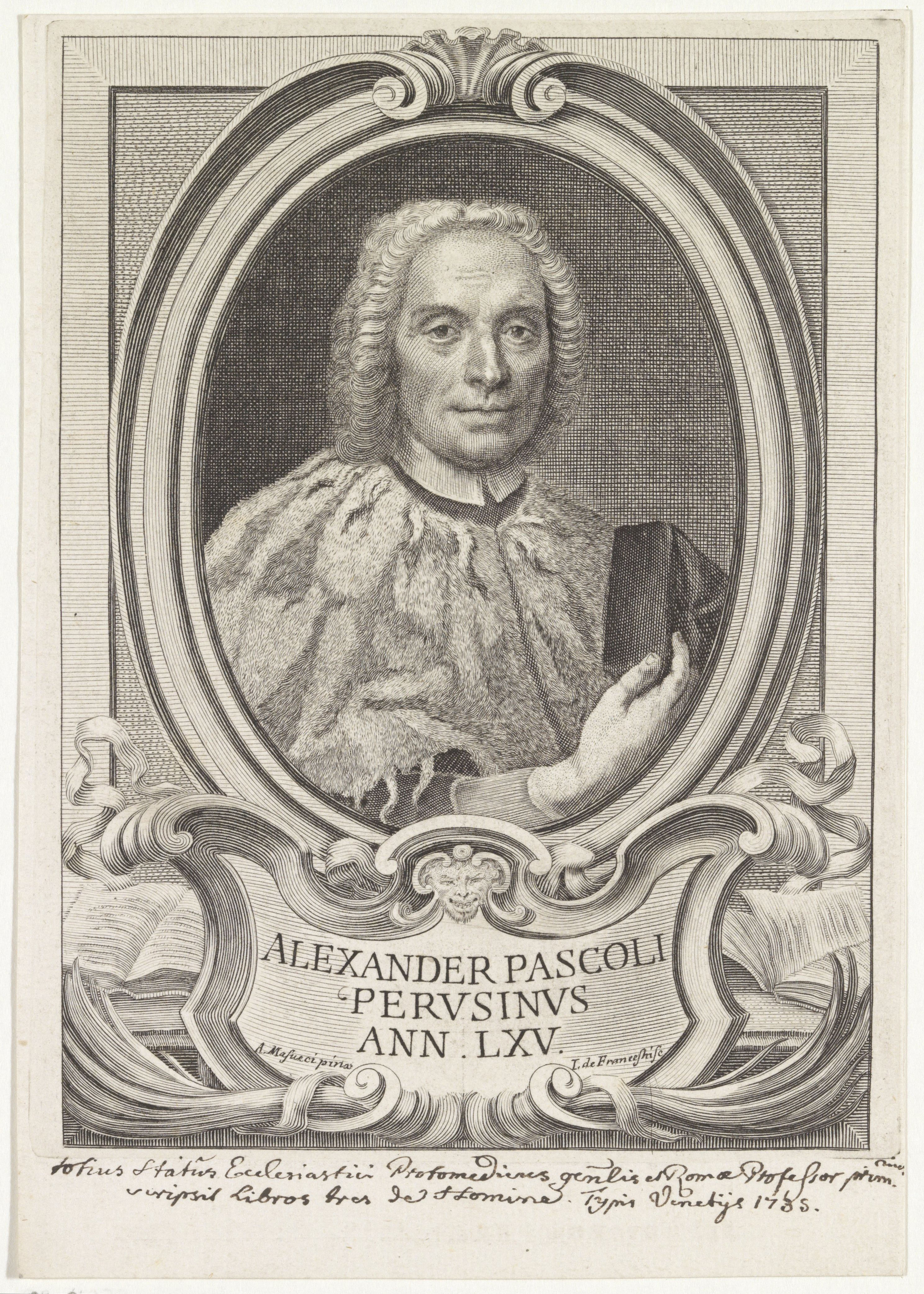 IdentificatieTitel(s): Portret van Alessandro PascoliObjecttype: prent Objectnummer: RP-P-1909-4927Opschriften / Merken: verzamelaarsmerk, verso, gestempeld: Lugt 2228opschrift, recto onder, handgeschreven in bruine inkt: ‘[...] Statius Exelesiastini Profomedicus [...] Typis Venetijs 1735.’VervaardigingVervaardiger: prentmaker: I. de Francestri (vermeld op object)naar schilderij van: Agostino Masucci (vermeld op object)Plaats vervaardiging: ItaliëDatering: in of na 1734Fysieke kenmerken: etsMateriaal: papier Techniek: etsenAfmetingen: plaatrand: h 186 mm × b 131 mmOnderwerpWat: historical personsportrait of a writerWie: Alessandro PascoliVerwerving en rechtenVerwerving: aankoop 1905Copyright: Publiek domein